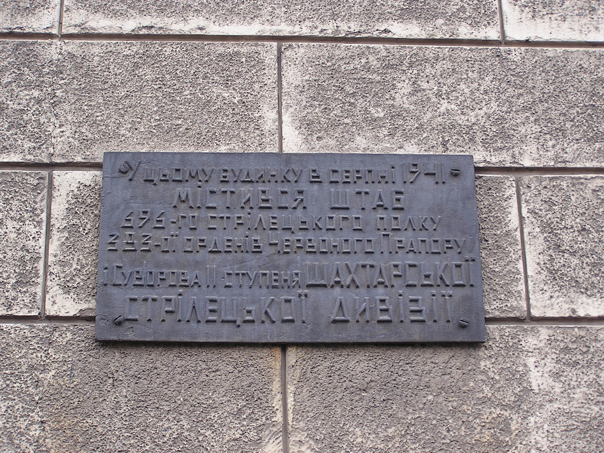 Мемориальная табличка в Донецке на здании ДК Франко, в котором размещался штаб дивизии в августе 1941 года